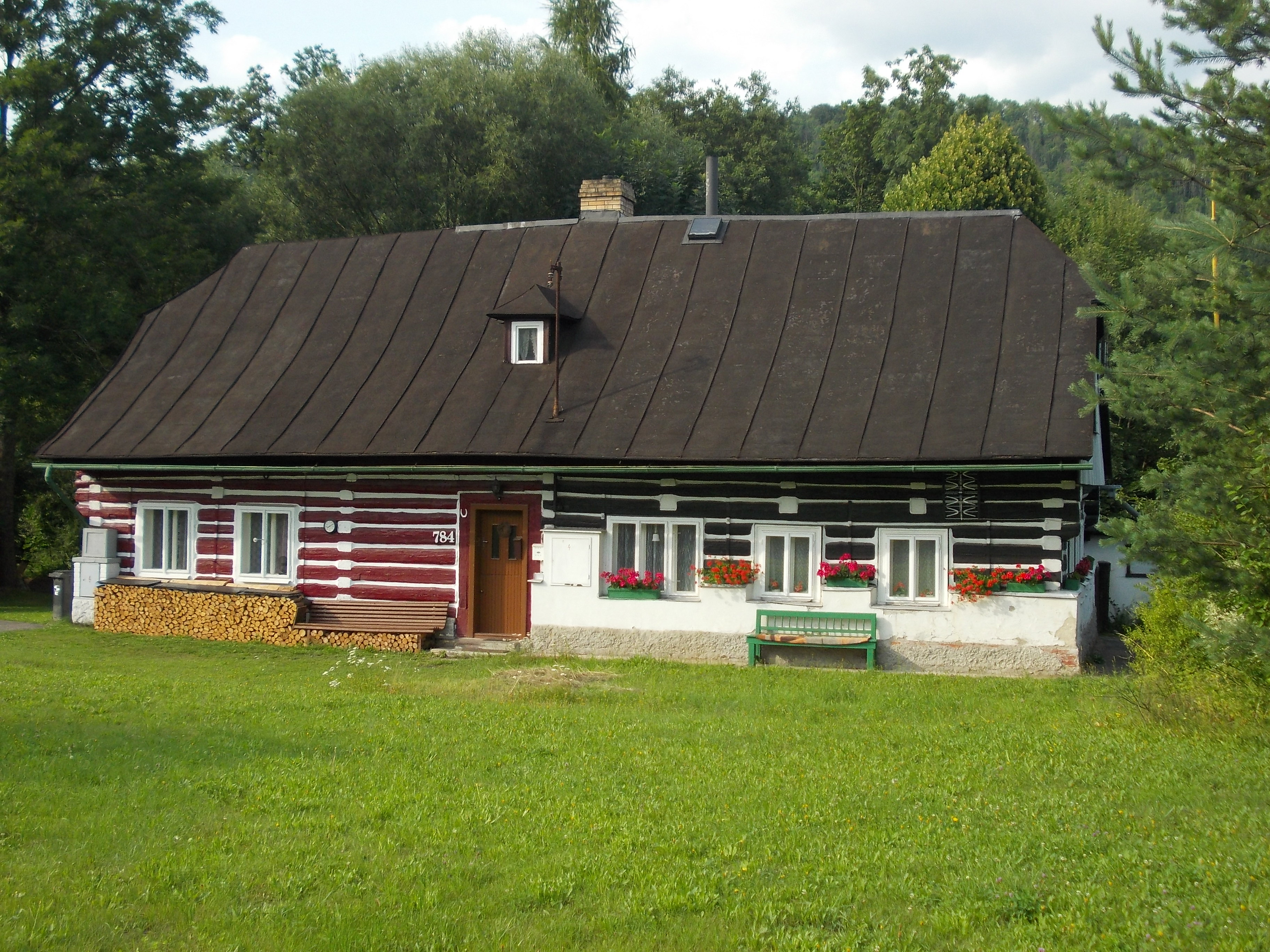 Hrabačov - dům č.p. 784